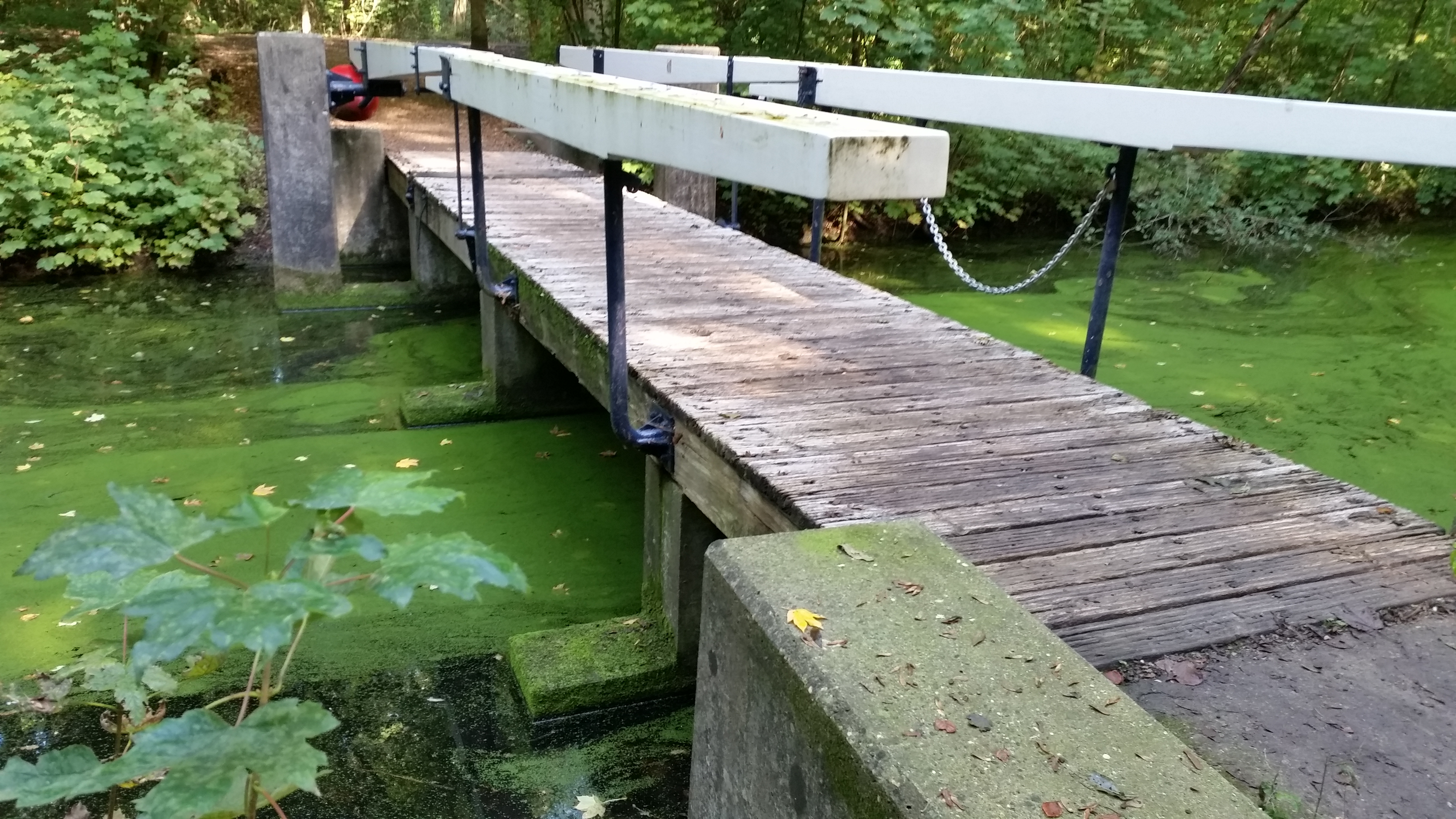 zijaanzicht van Brug 549 (in Amsterdam)